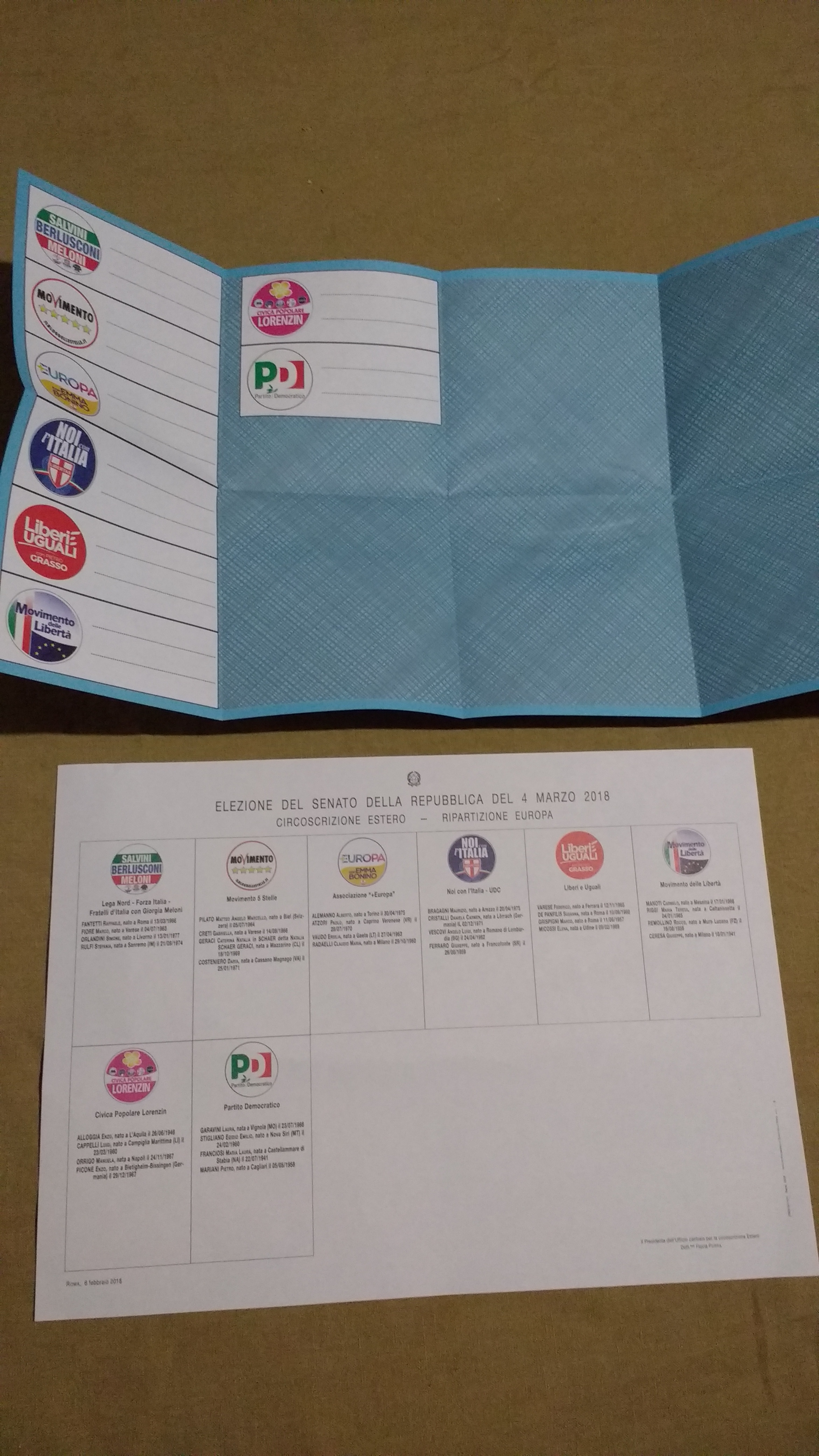 Elezione del Senato della Repubblica del 4 Marzo 2018. Circoscrizione Estero - Ripartizione Europa.